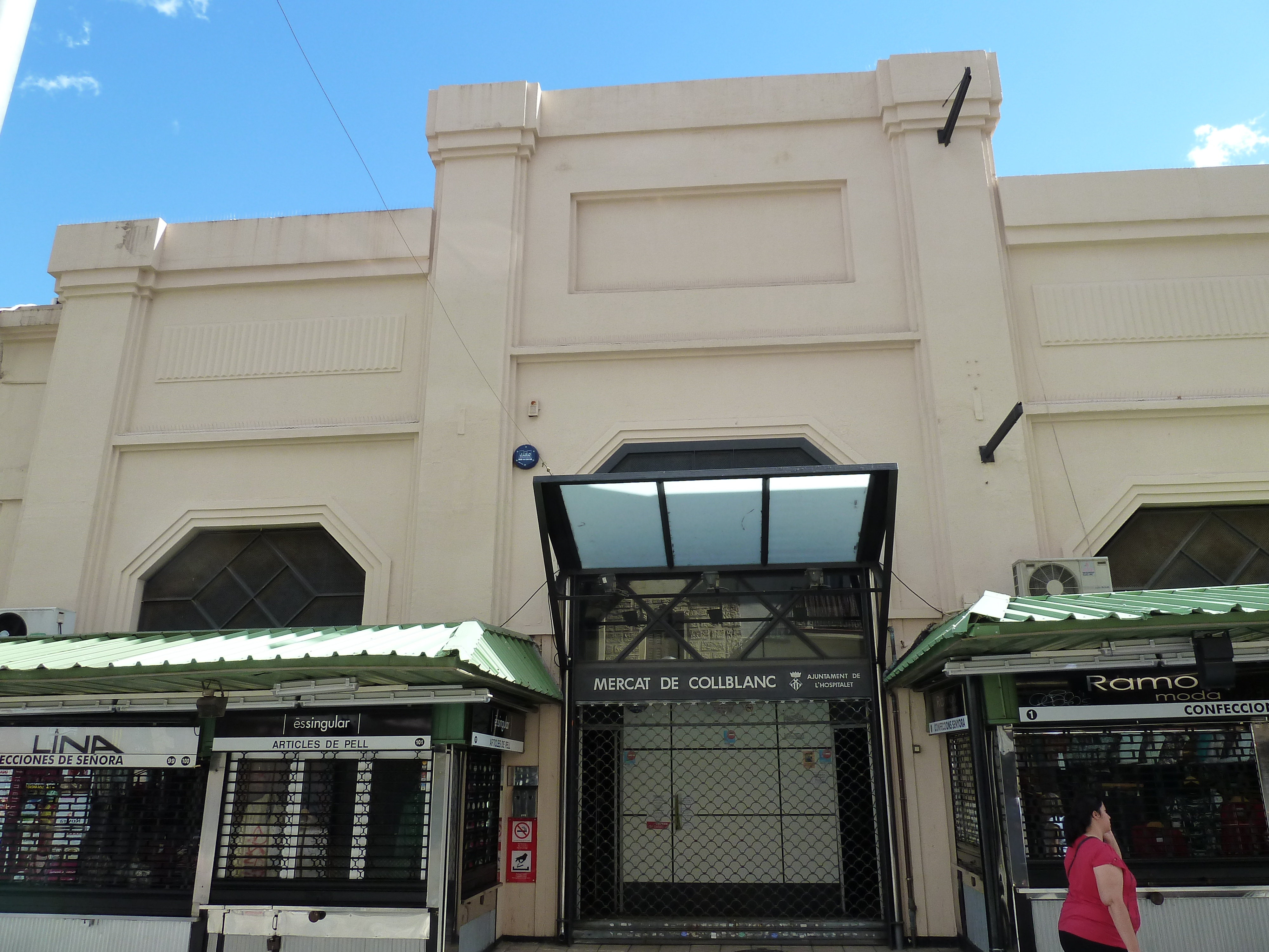 L'Hospitalet de Llobregat